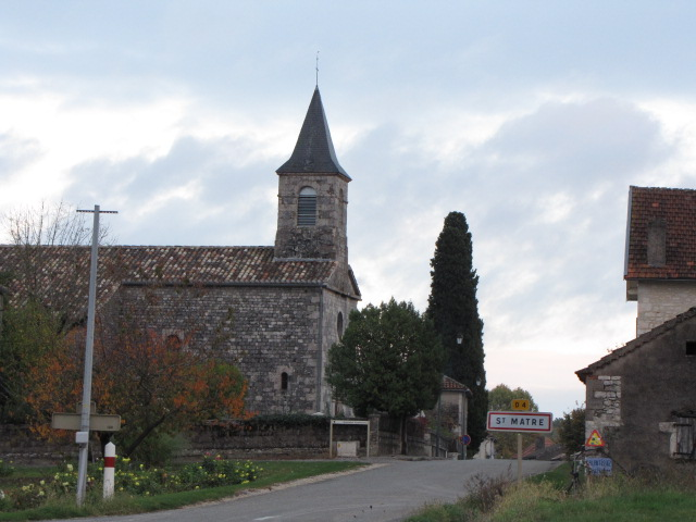 Saint-Matré